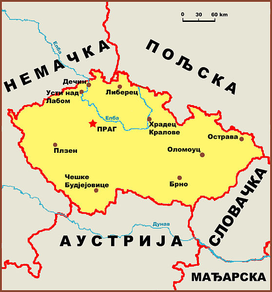 Аутор: Саша Костић Чешка мапа Licensing